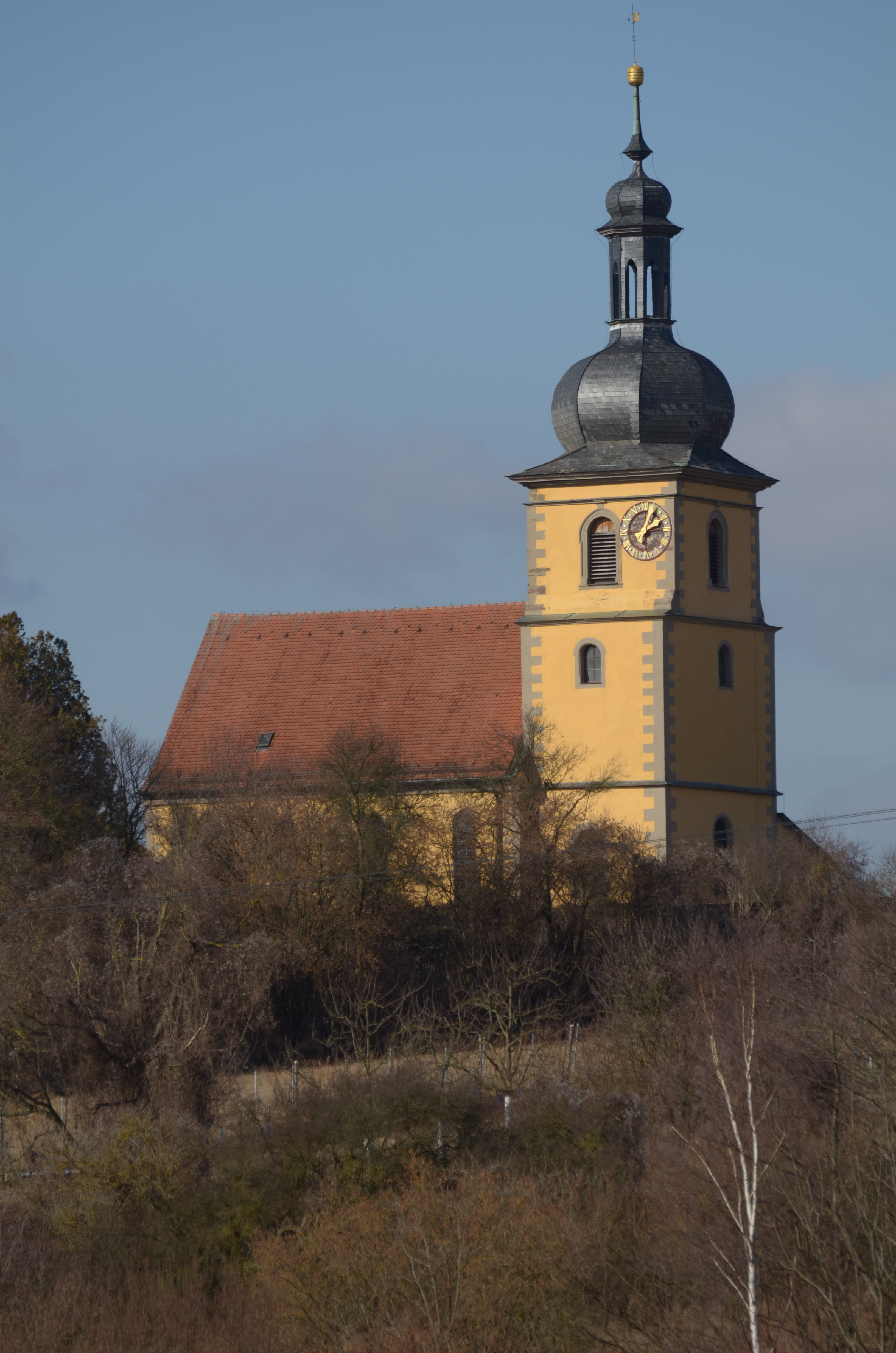 Pfarrkirche im Stadtteil Holzhausen von Königsberg in Bayern